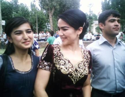 Нигина Аманкулова (в середине), певица из Таджикистана. Среди своих поклонниковТоҷикӣ: Дар байни мухлисон, Нигина Амонқулова, сароянда аз Тоҷикистон